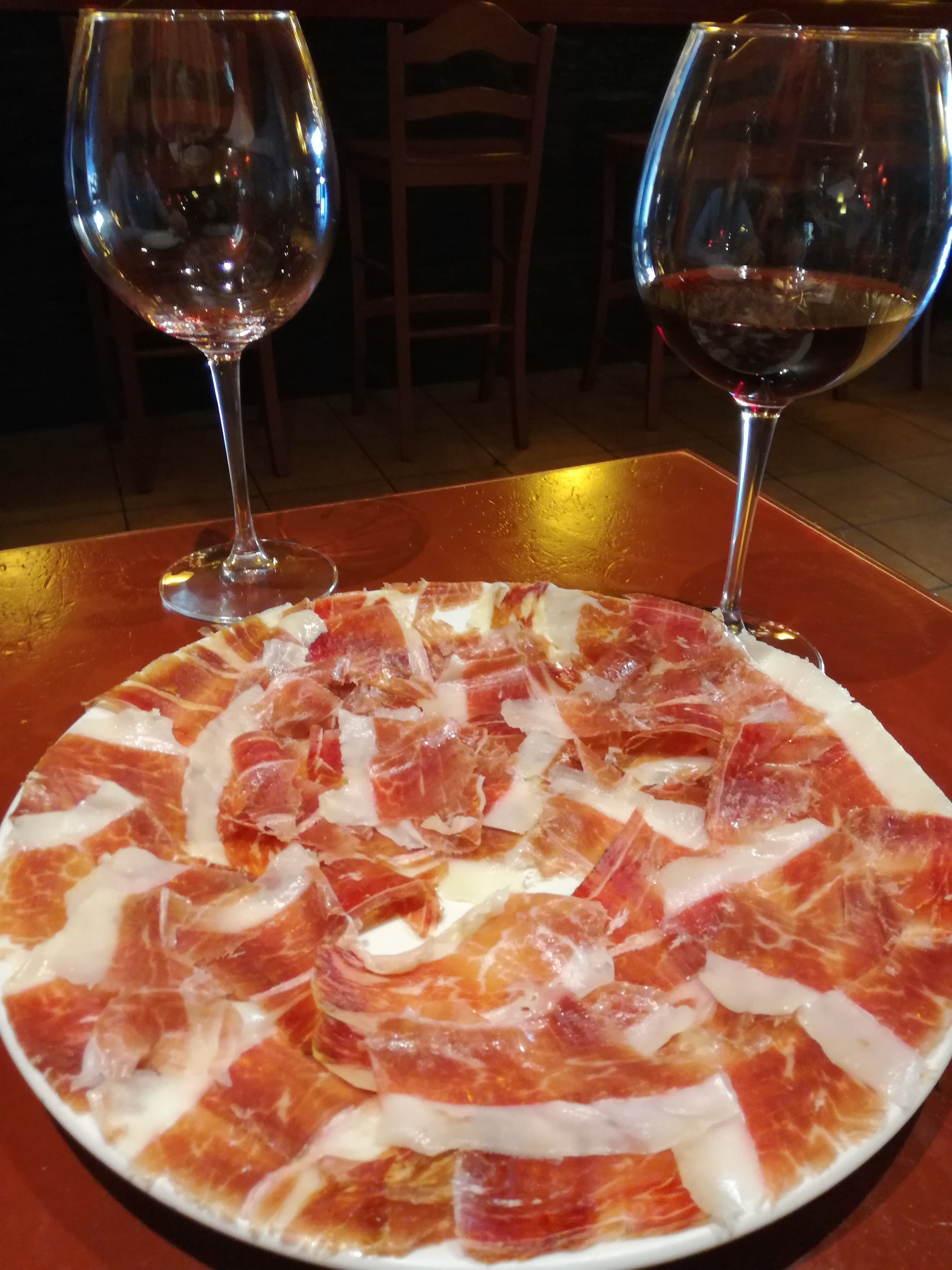 Un plato de jamón maridado con vino tinto.